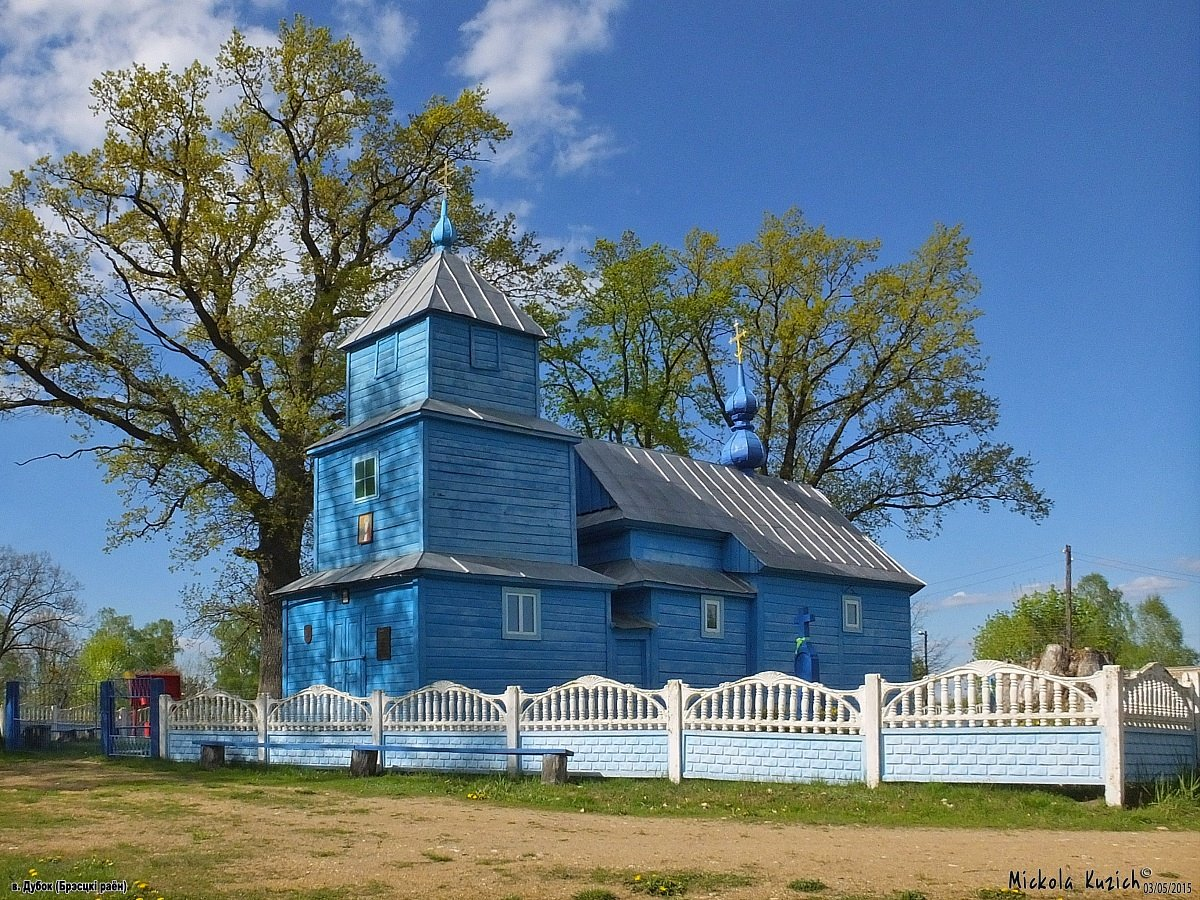 Дубок. Свята-Ільінская царква